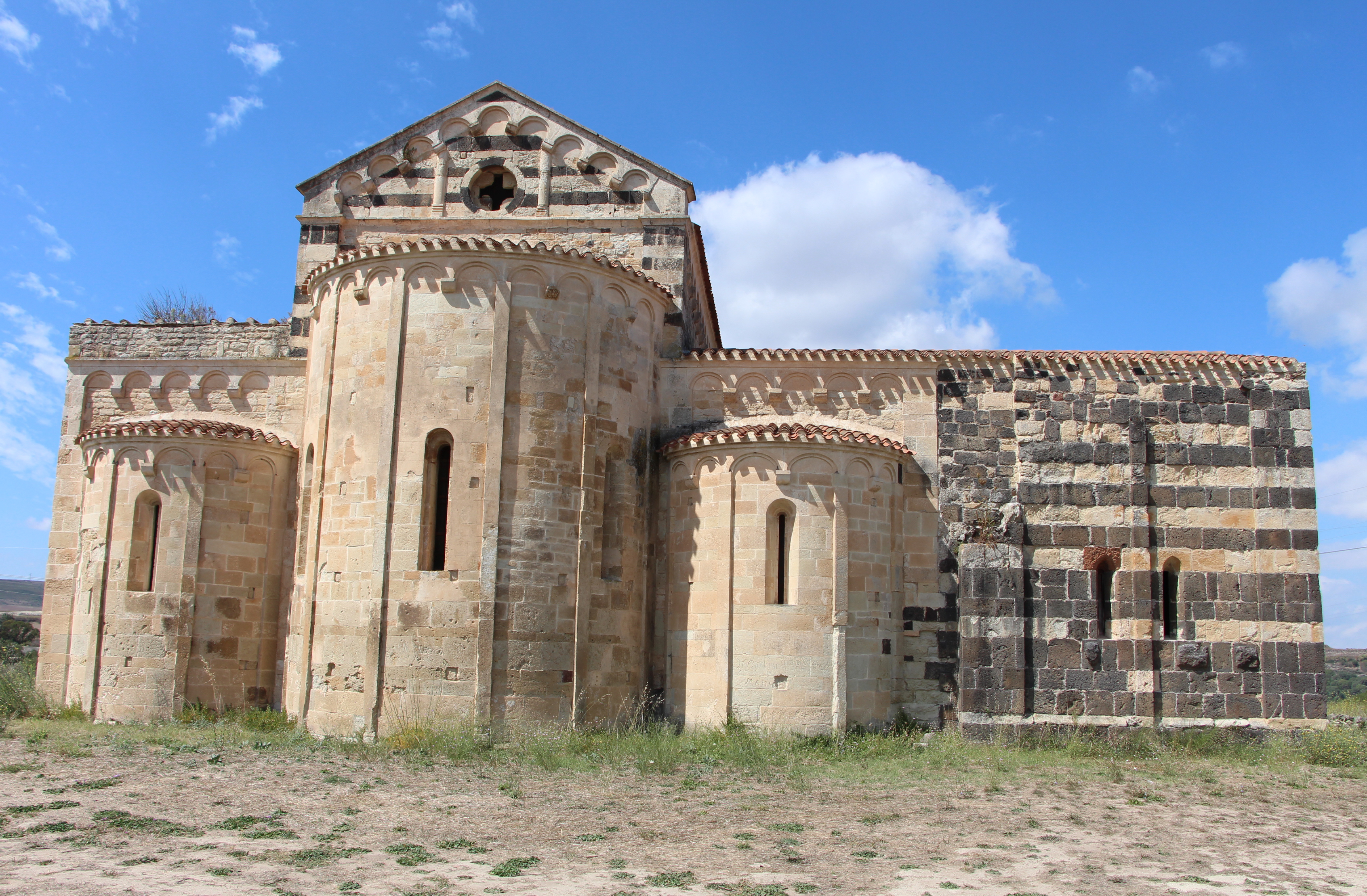 Ploaghe, SS